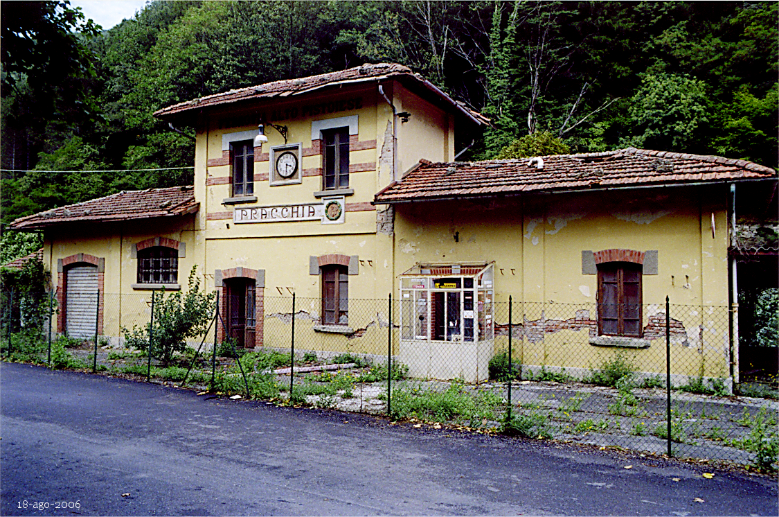 La stazione FAP a Pracchia. Mia foto con clone di Pentax reflex, grandangolo 28 mm e pellicola a 400 ISO. Le nubi ammorbidiscono la luce.